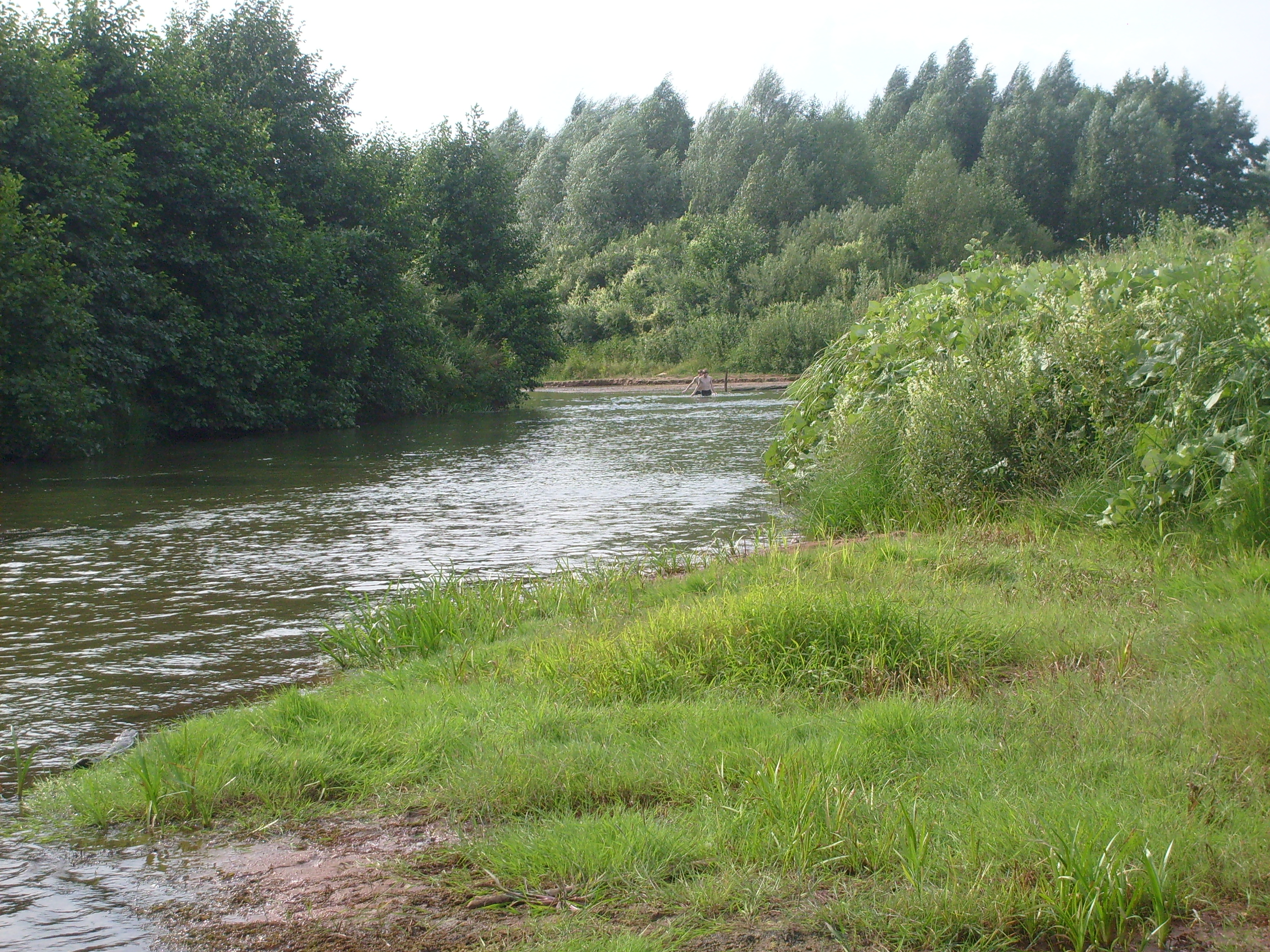 Река Сивинь в районе села Старое Синдрово Краснослободского района Мордовии в месте впадения реки Мадаевка